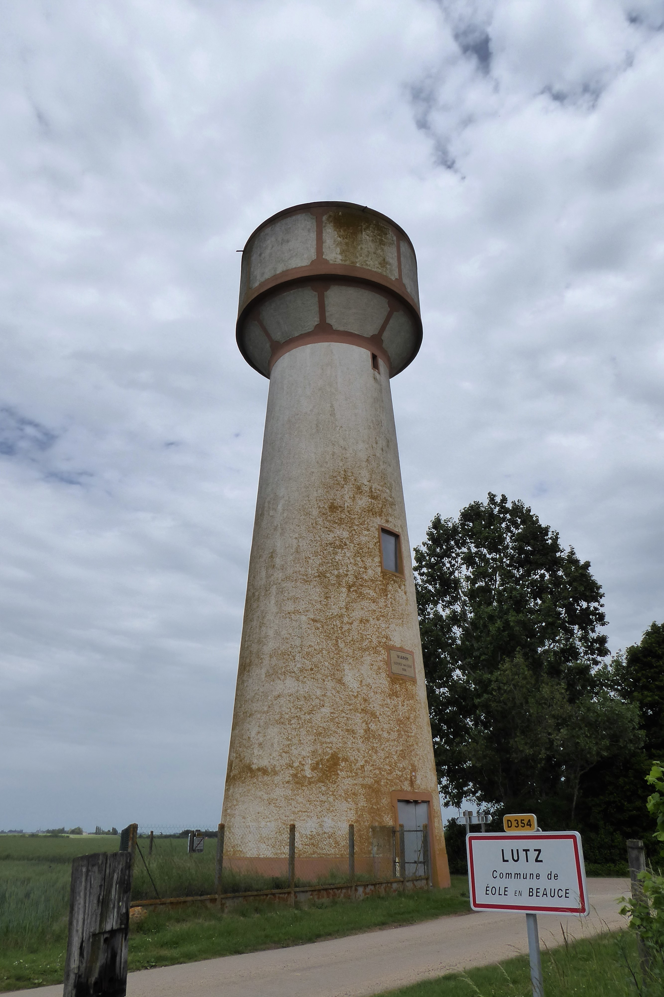 Lutz, château d'eau de Viabon 1934, Eole-en-Beauce, Eure-et-Loir, France.